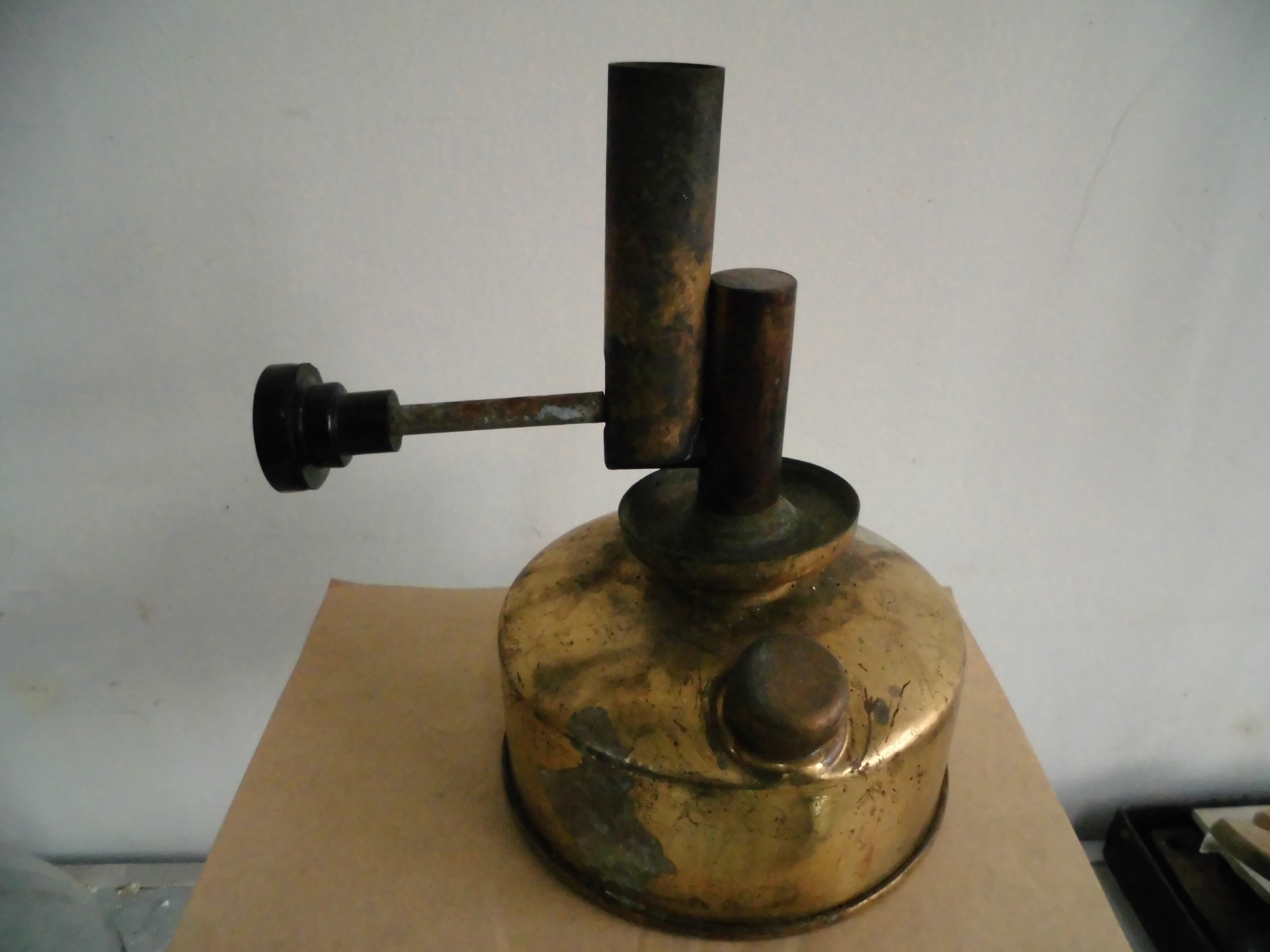 酒精喷灯，高温加热用。